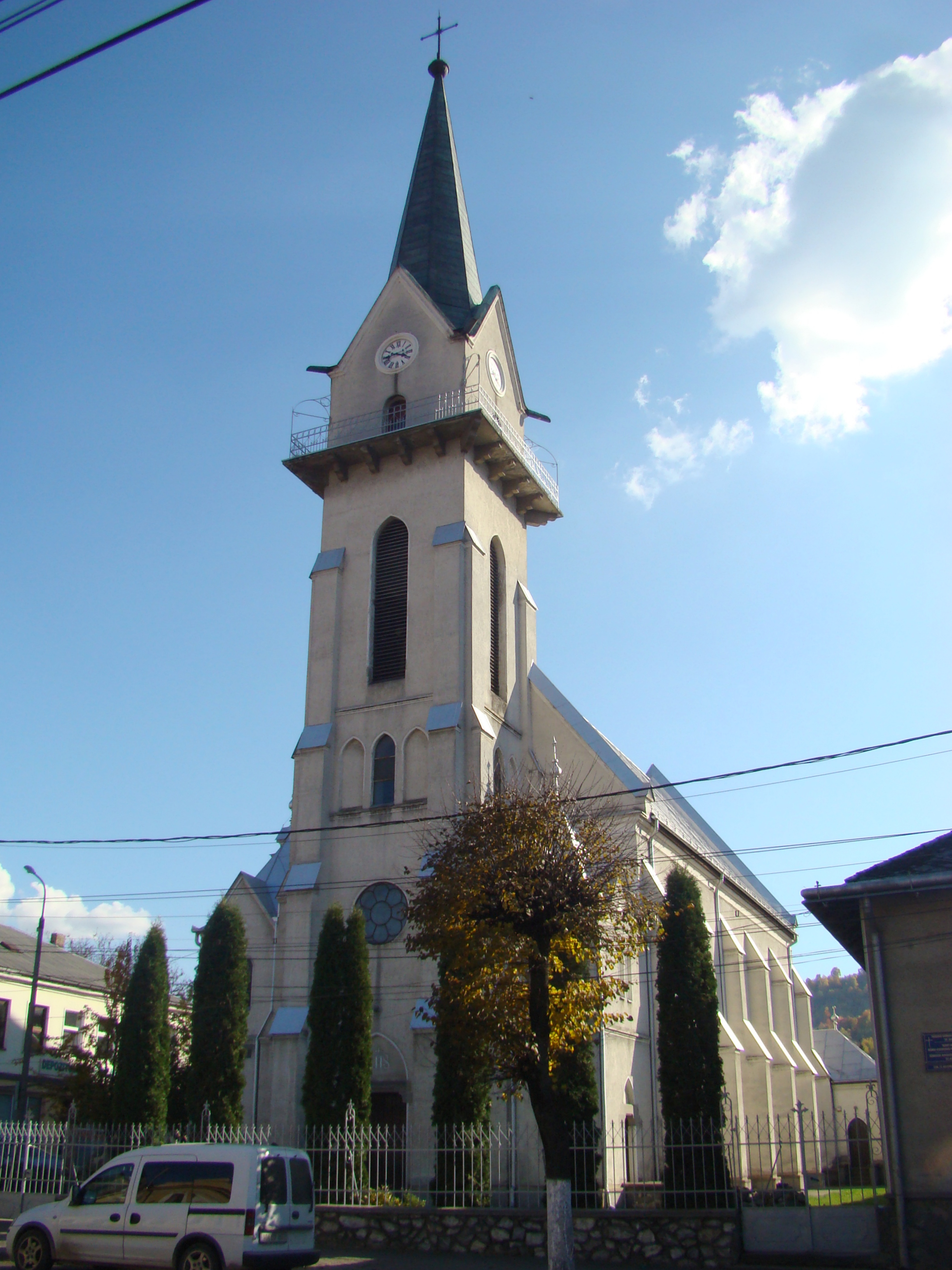 Biserica romano-catolică "Ioan și Ana", oraș Vișeu de Sus